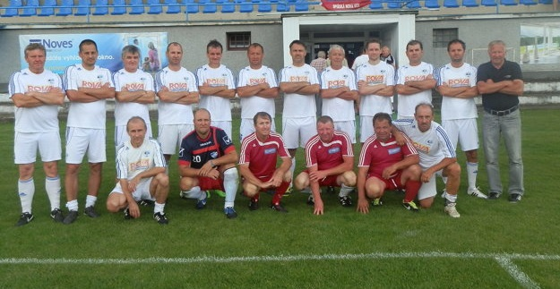 Mužstvo bývalých hráčov Spišskej Novej Vsi.